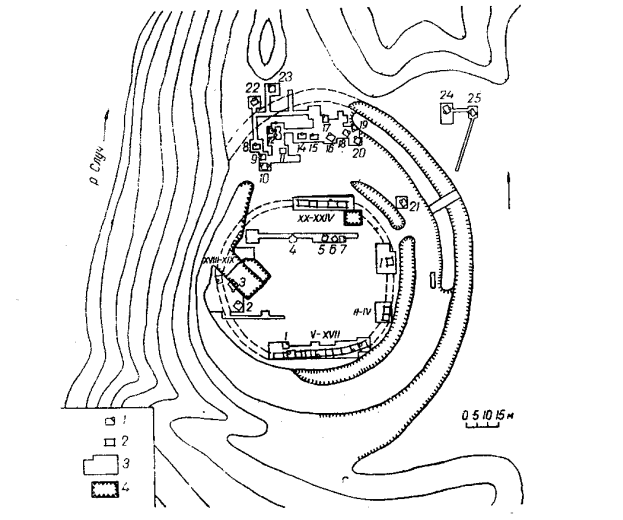 План давньоруського городища в селі Колодяжне 1 - житла напівземляного типу, 2- житла-кліті, 3 - розкопи, 4 - котловани